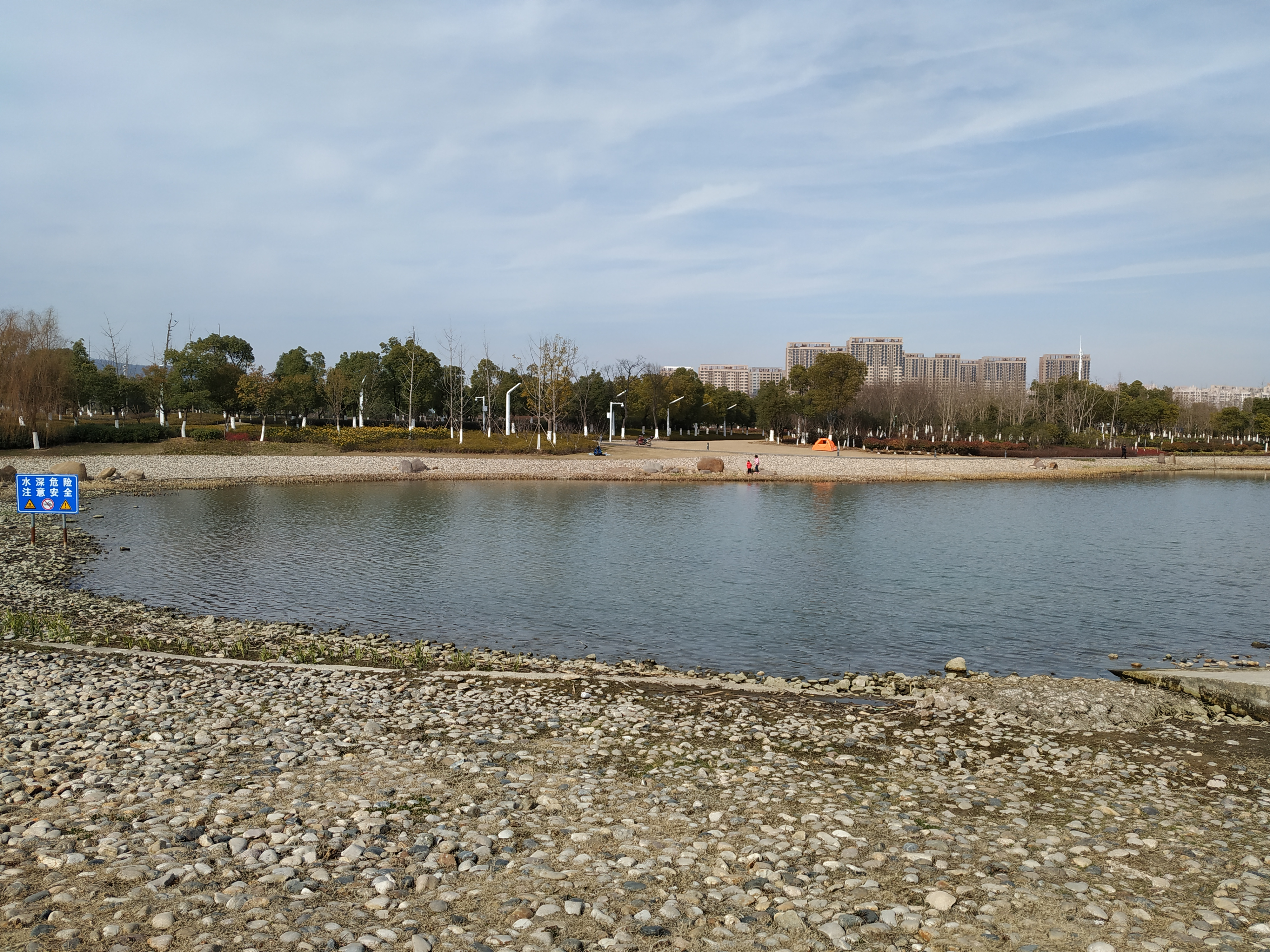 中文（中国大陆）: 南京市麒麟生态公园